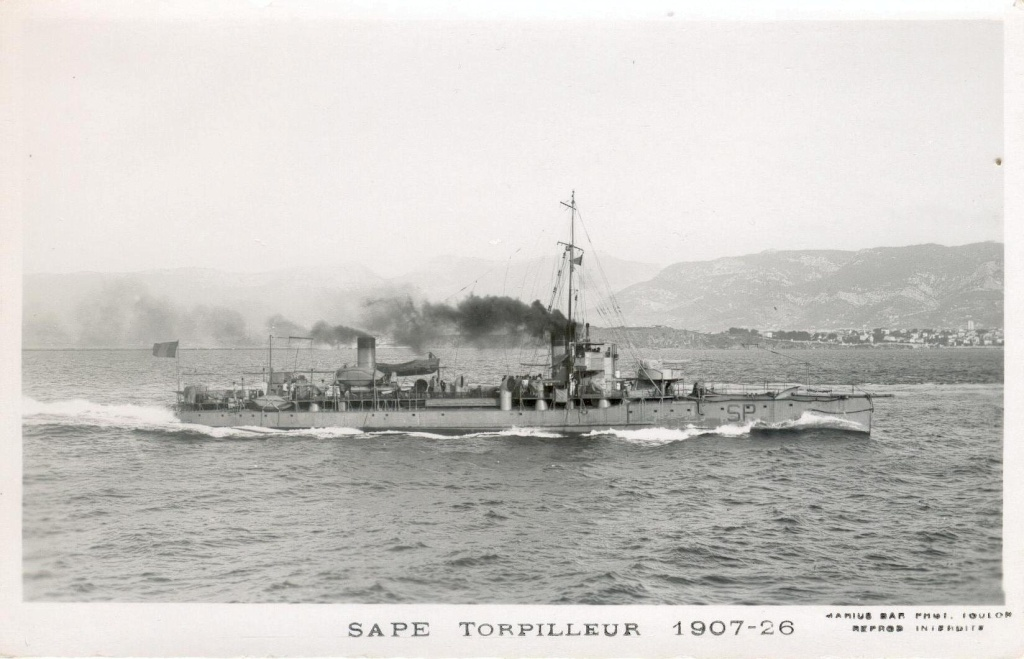 Destroyer (contre-torpilleur) français Sape, de classe Baranlebas (1905-1909)